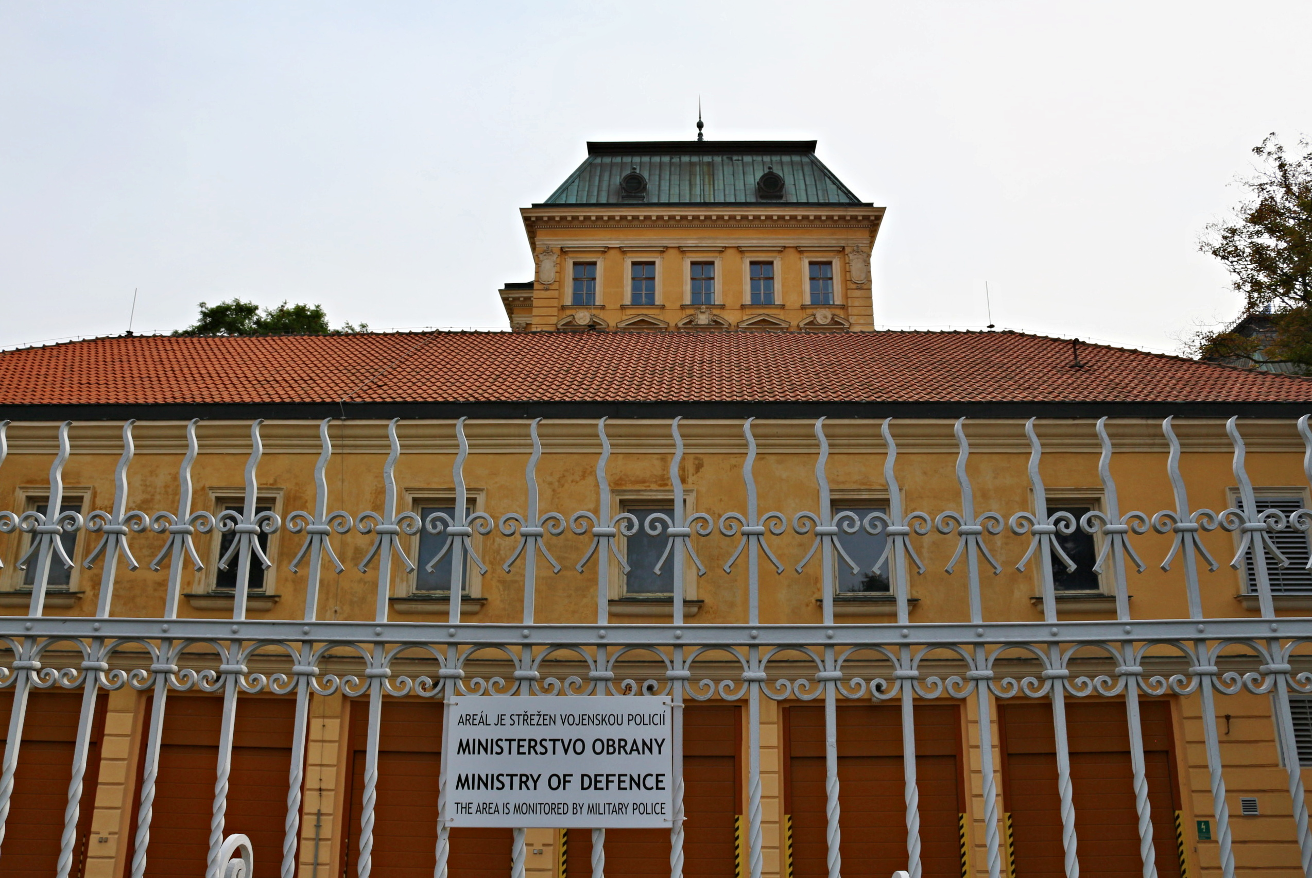 Praha-Hradčany, Kadetní škola Ministerstva obrany